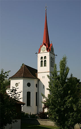 Kirche von Ettiswil